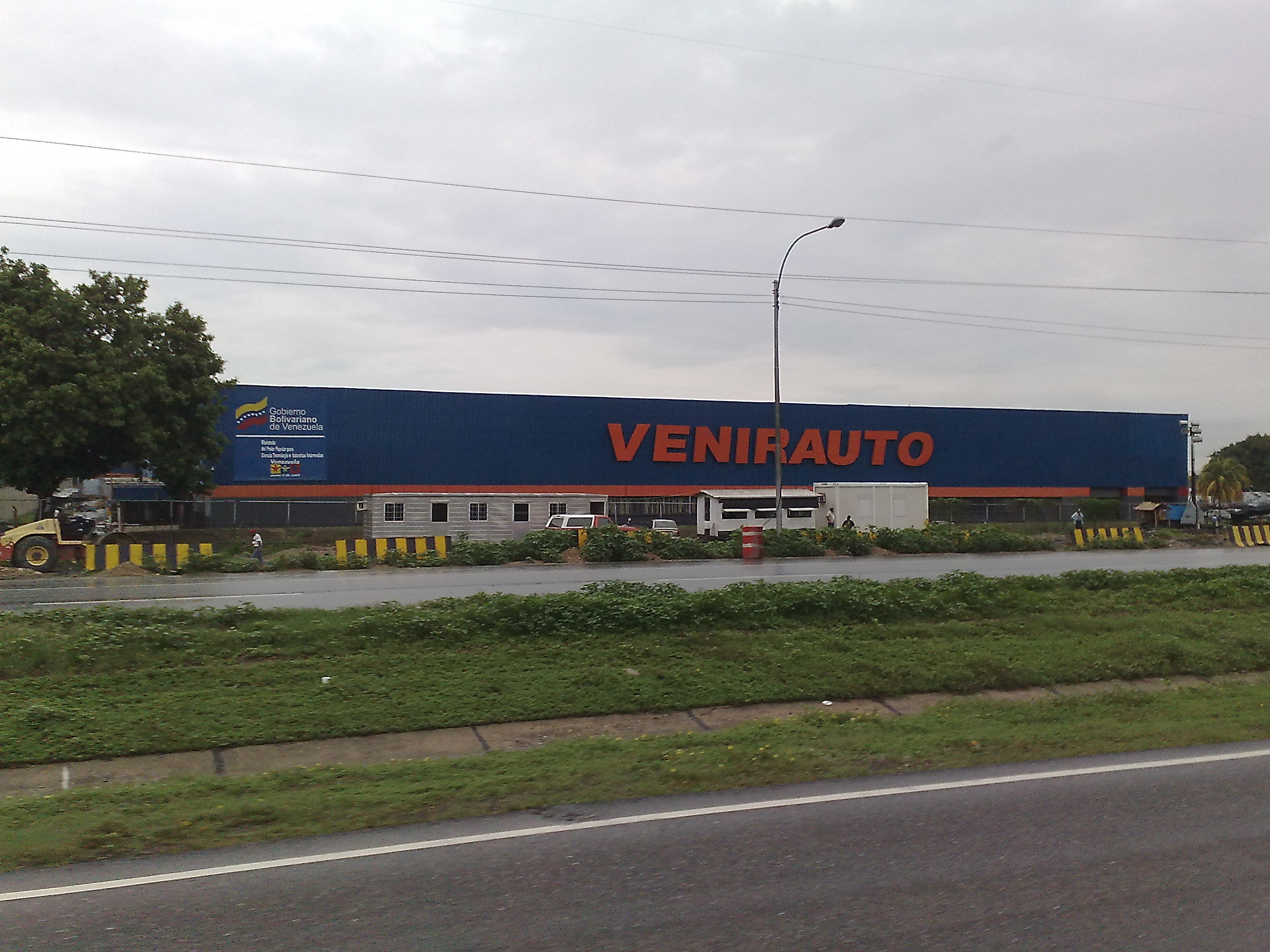 Venirauto.